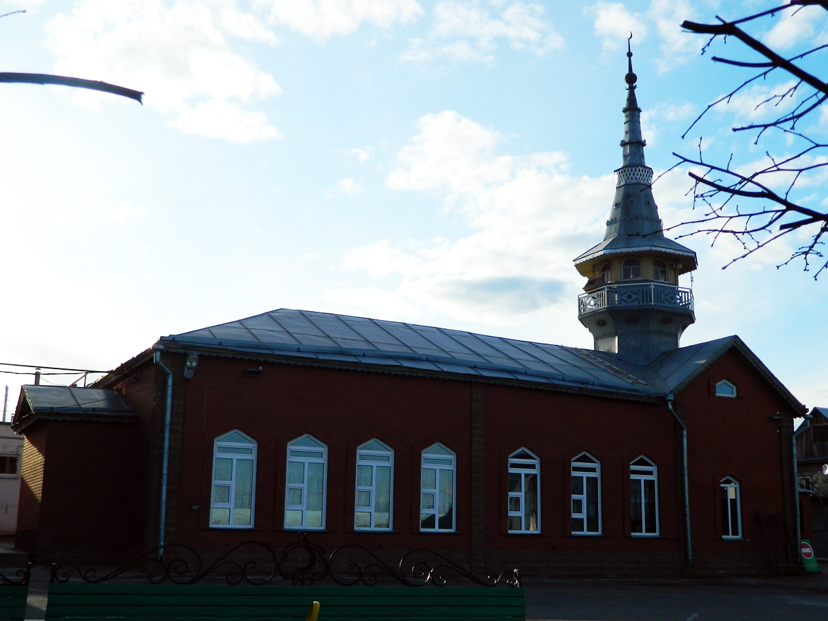 Старое здание Ижевской соборной мечети